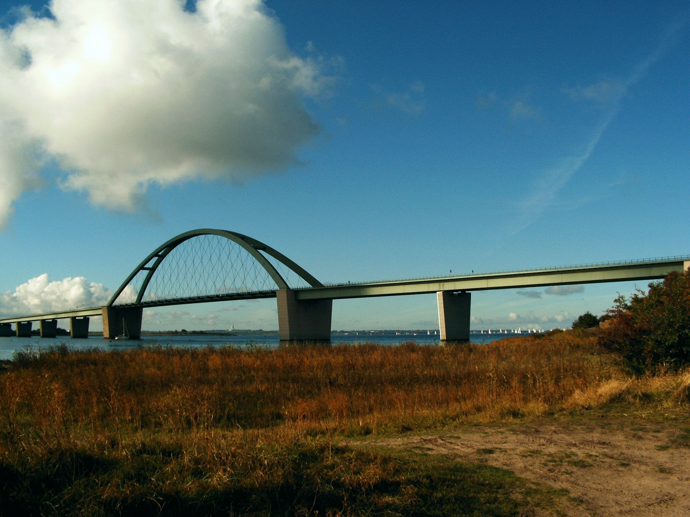 Fehmarnsundbrücke vom Wulfener Hals aus